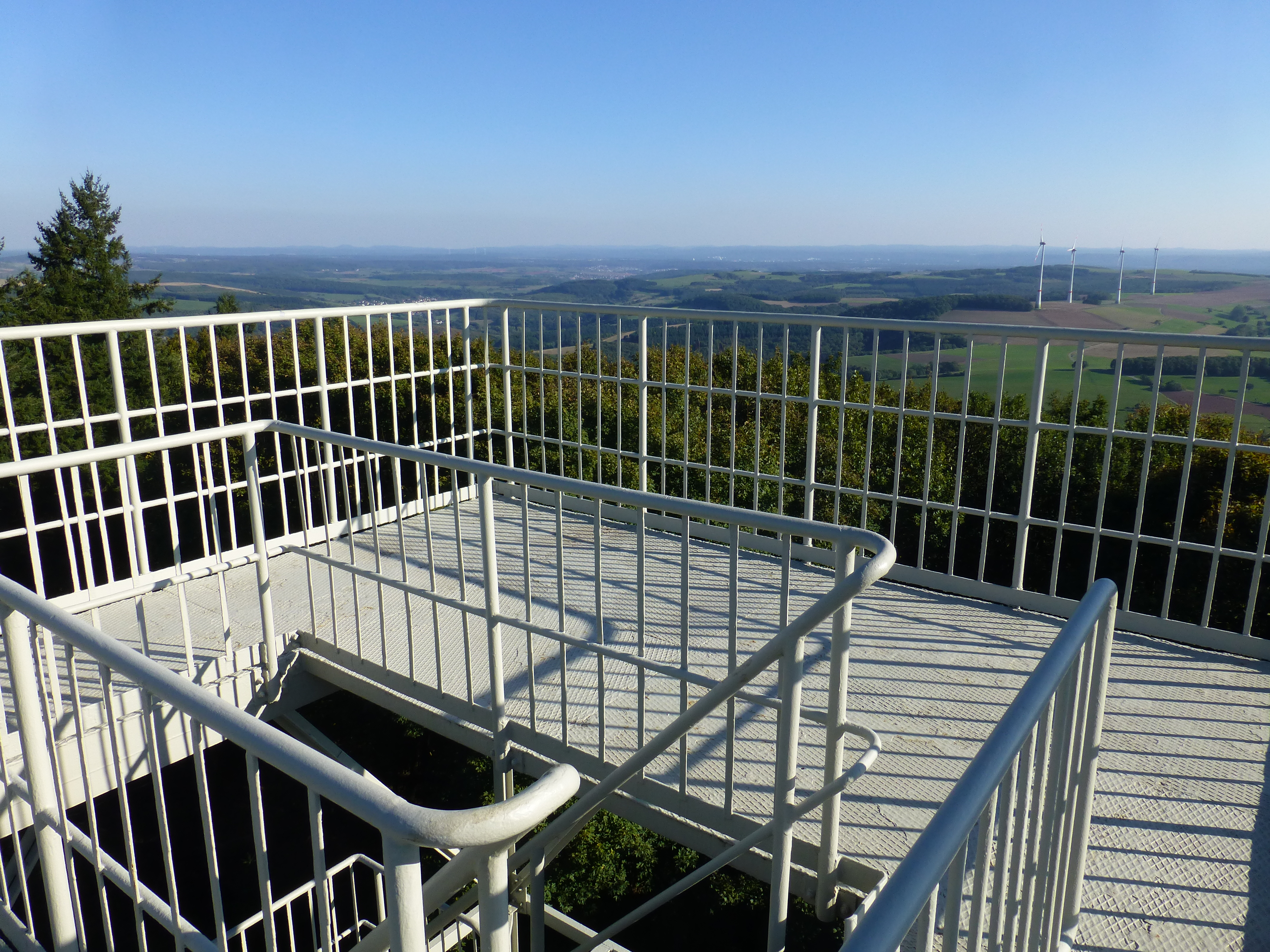 Selbergturm; obere Aussichtsplattform mit Blick nach Südosten